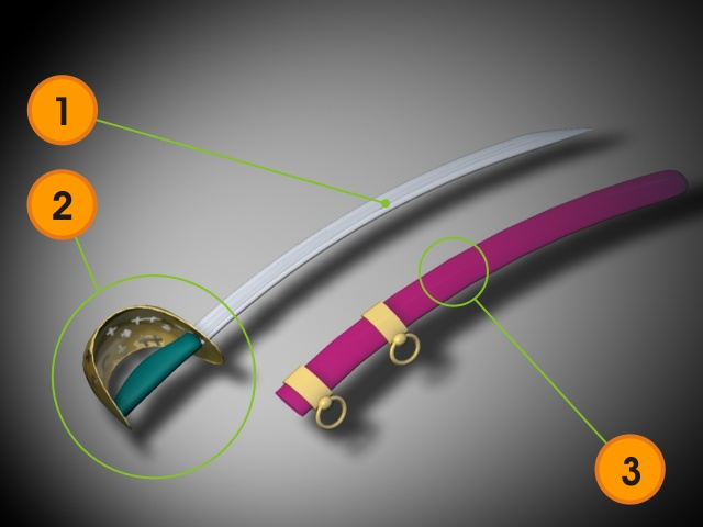 Cavalry sabre graphics description